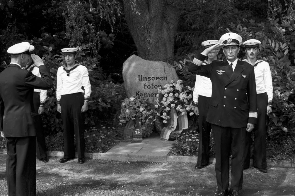 Die Marineflieger feiern ebenso wie der Fliegerhorst Holtenau sechzigjähriges Bestehen. Zum Stein mit der Inschrift "Unseren toten Kameraden" salutiert der Vorsitzende der Kameradschaftlichen Vereinigung der Marineflieger, Kapitän zur See a. D. Hermann Lessing. Vorn rechts der Kommandeur der Marinefliegerdivision, Flottillenadmiral Paul Kriebel.